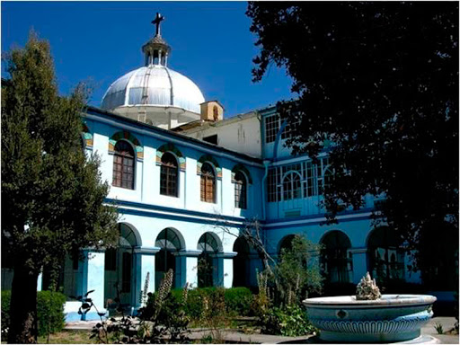 Olivo